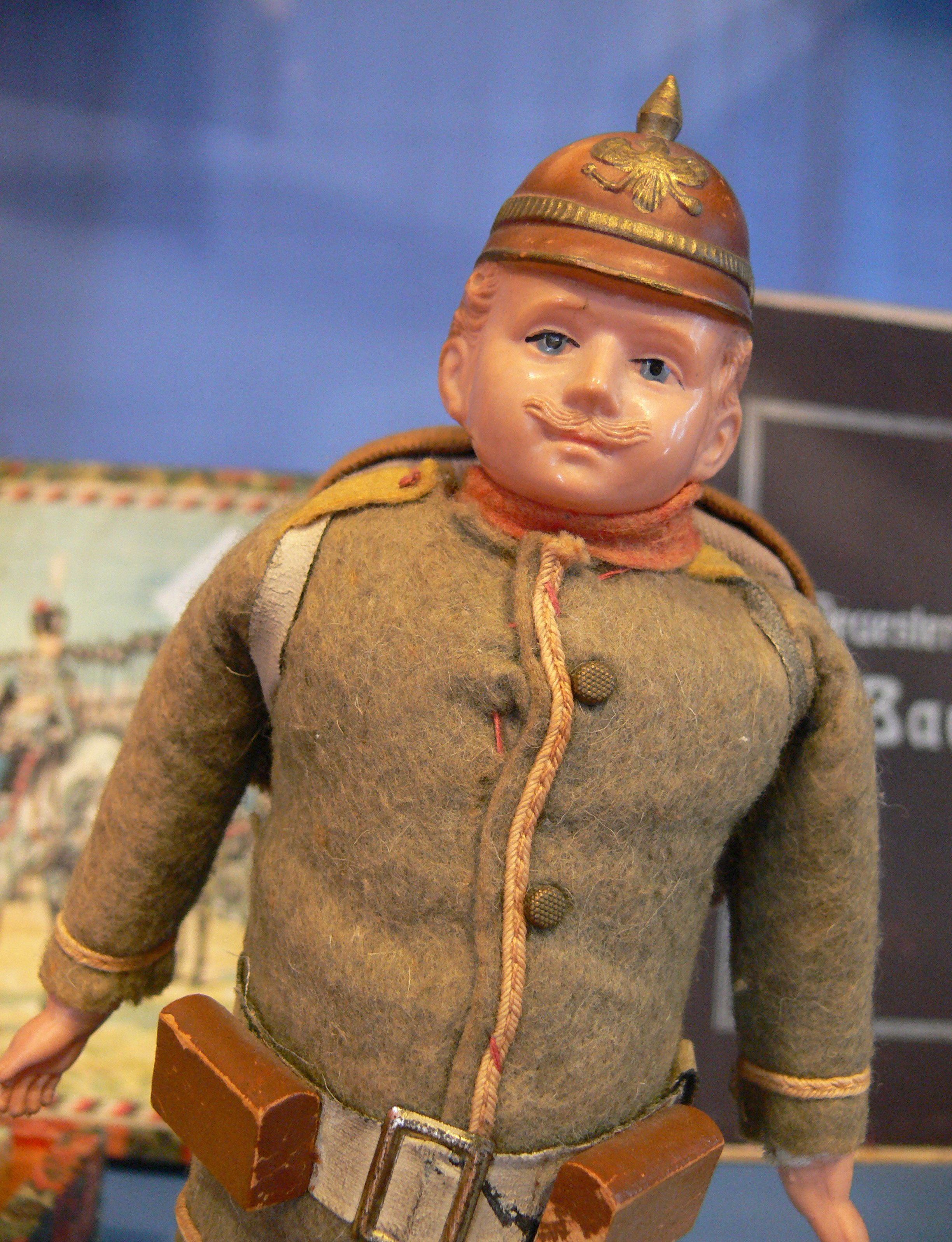 Sammlung Kindheit und Jugend (Stiftung Stadtmuseum Berlin) Soldatenpuppe (Deutschland, ca. 1900 bis ca. 1918?)